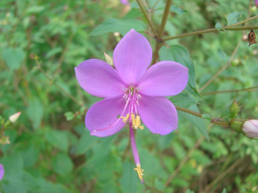 Rynchanthera cordata - MELASTOMATACEAE - Praia do Sonho - Palho�a - SC - Brasil